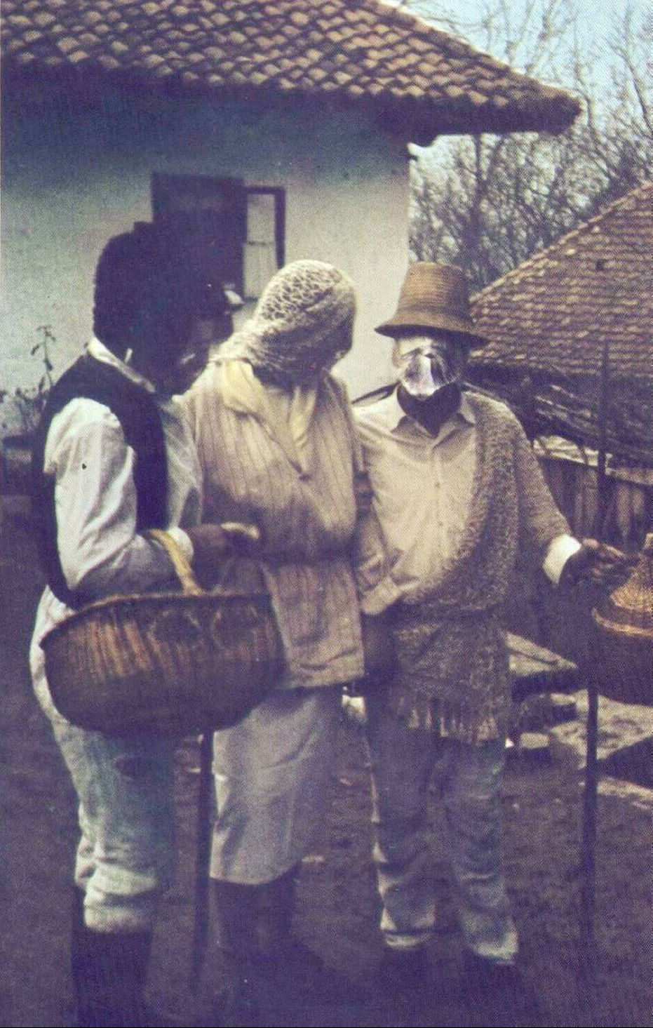 Ряженые на Масленицу. Сербия